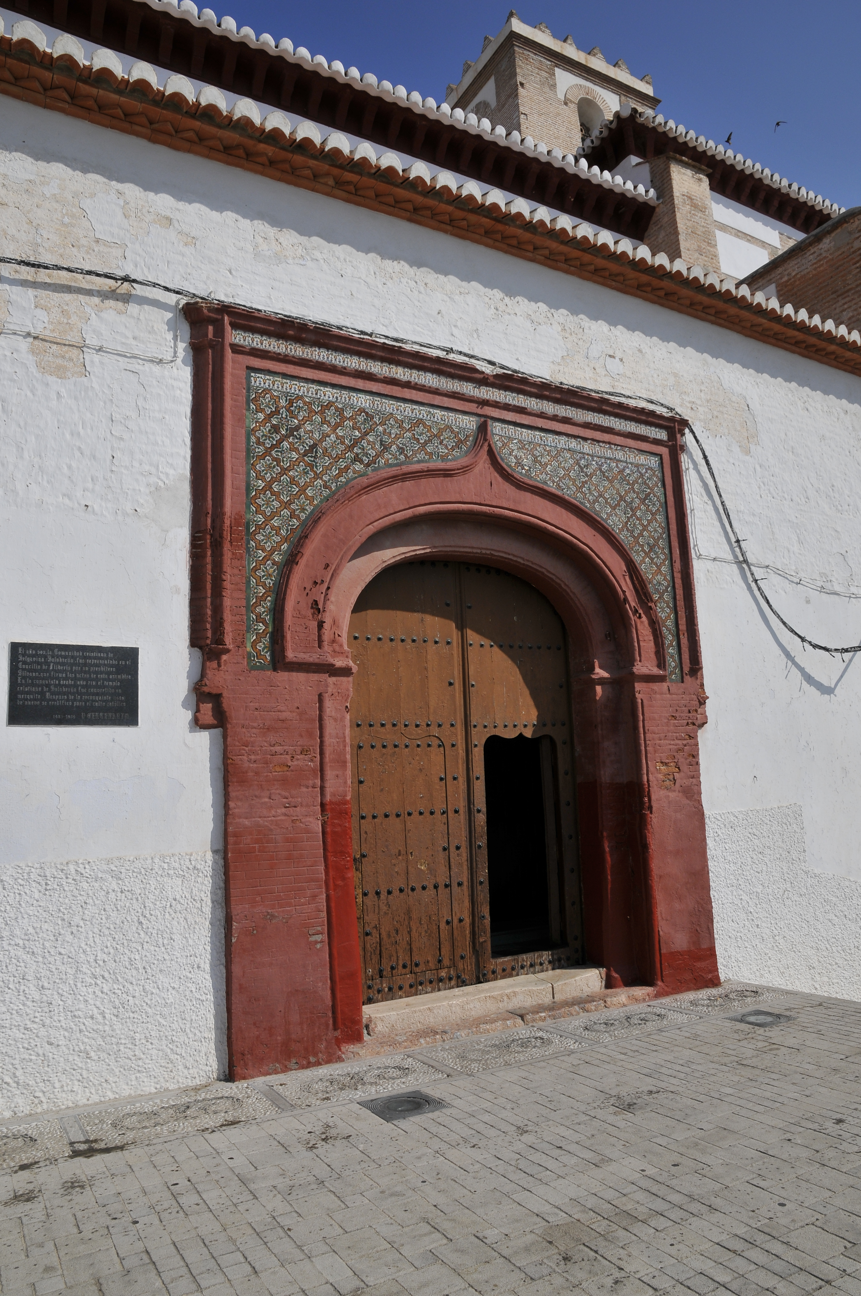 Salobreña